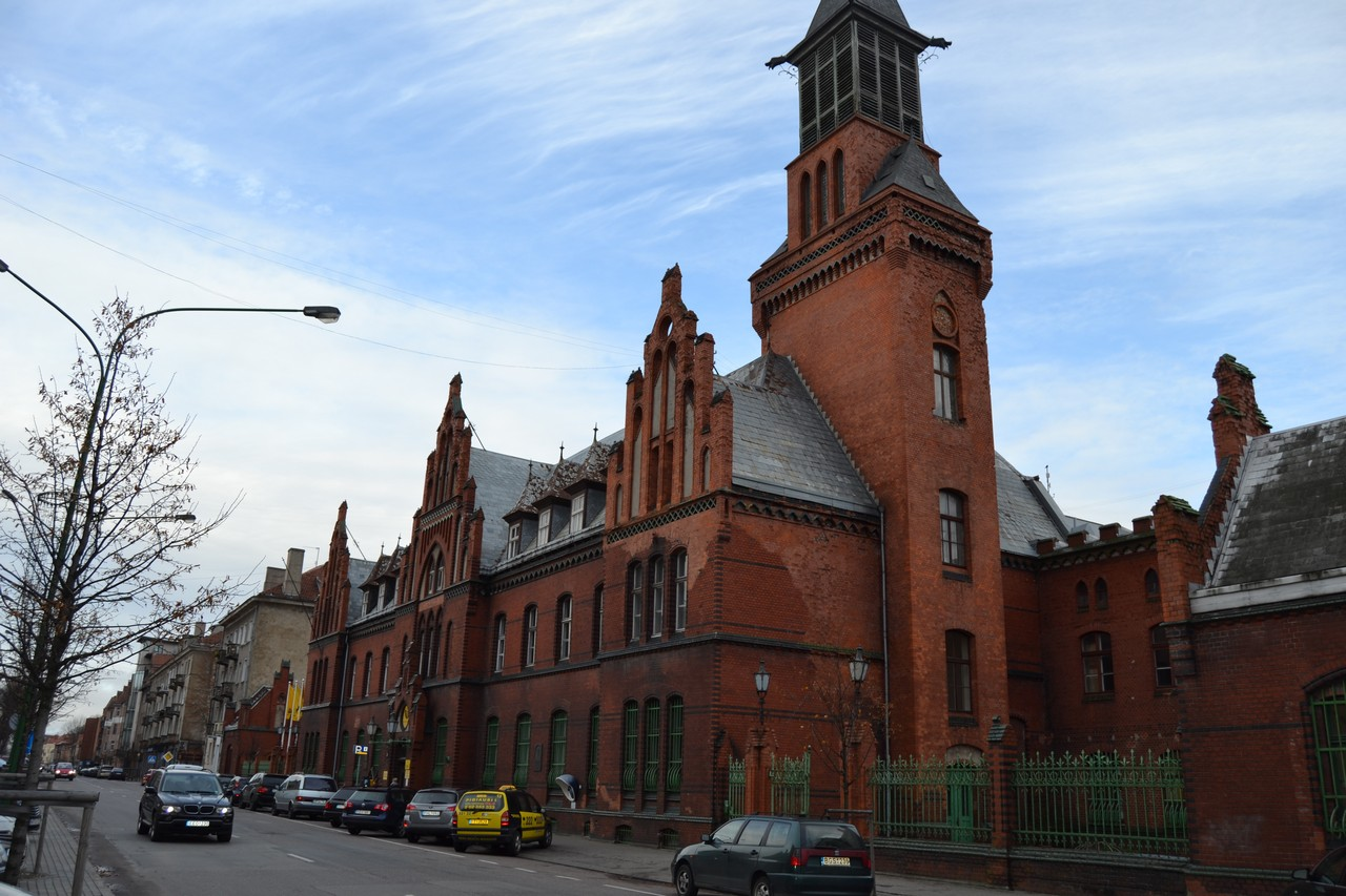 Argelanderio namai Klaipėdoje (Mėmelyje). Šiuose namuose taip pat gyveno Karalienės Luizės vaikai kai Prūsijos Sostinė buvo perkelta į Mėmėlį. Dabar Karališkieji pašto rūmai.